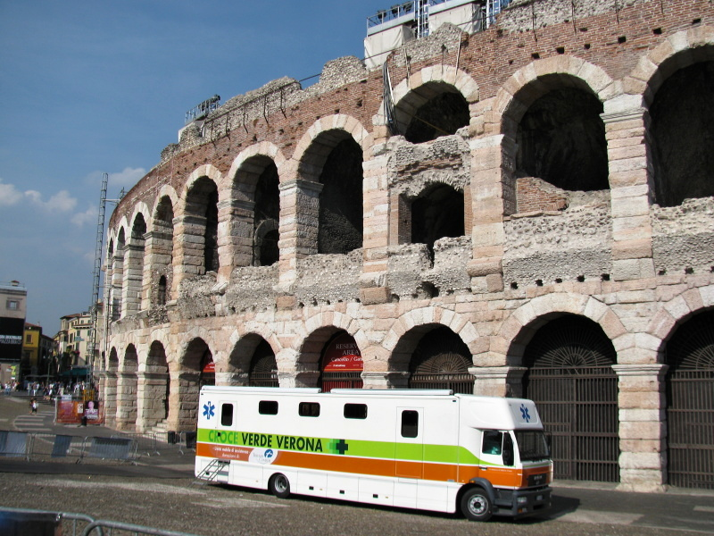 Verona